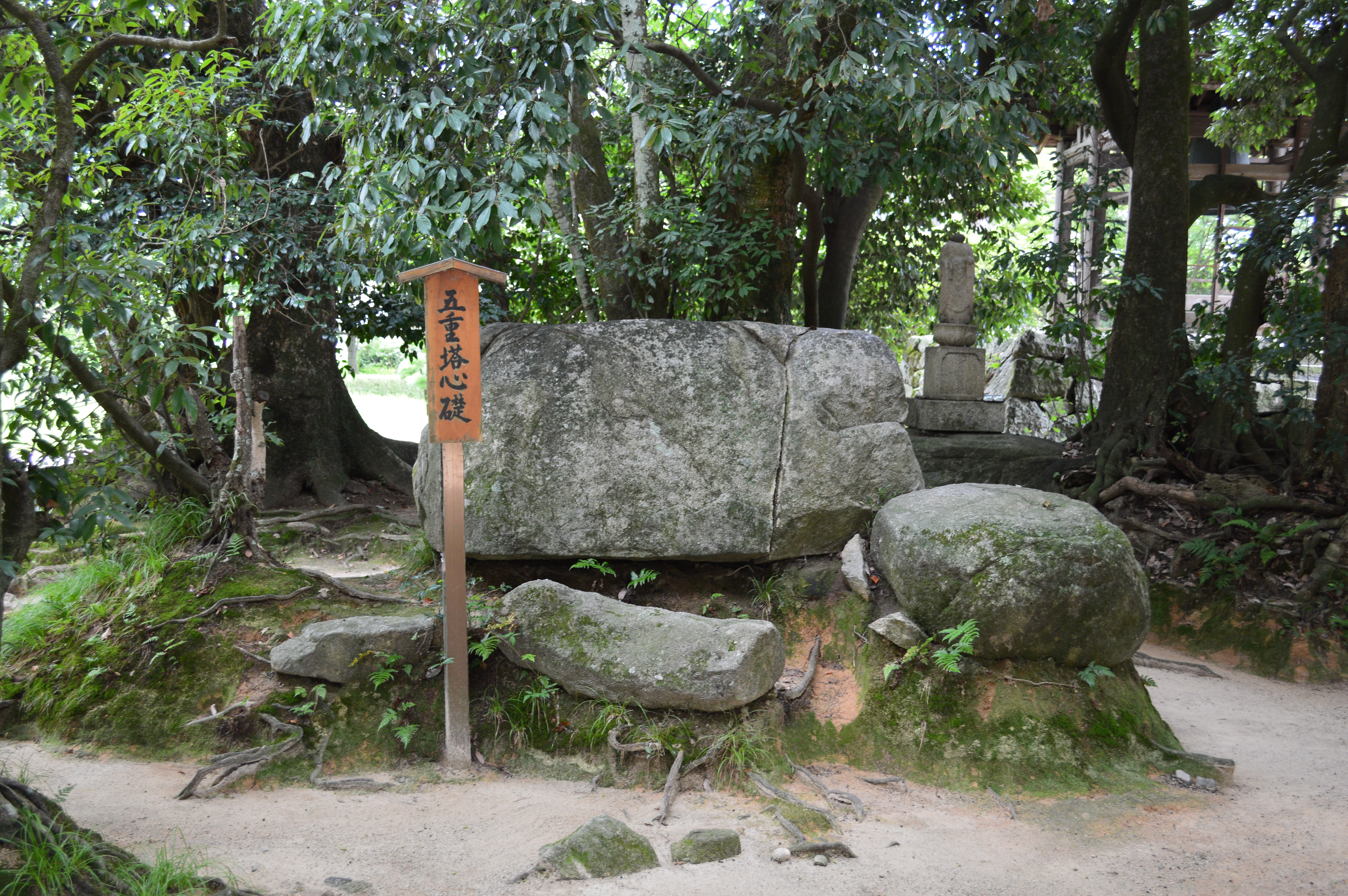 観世音寺 (太宰府市) 塔心礎